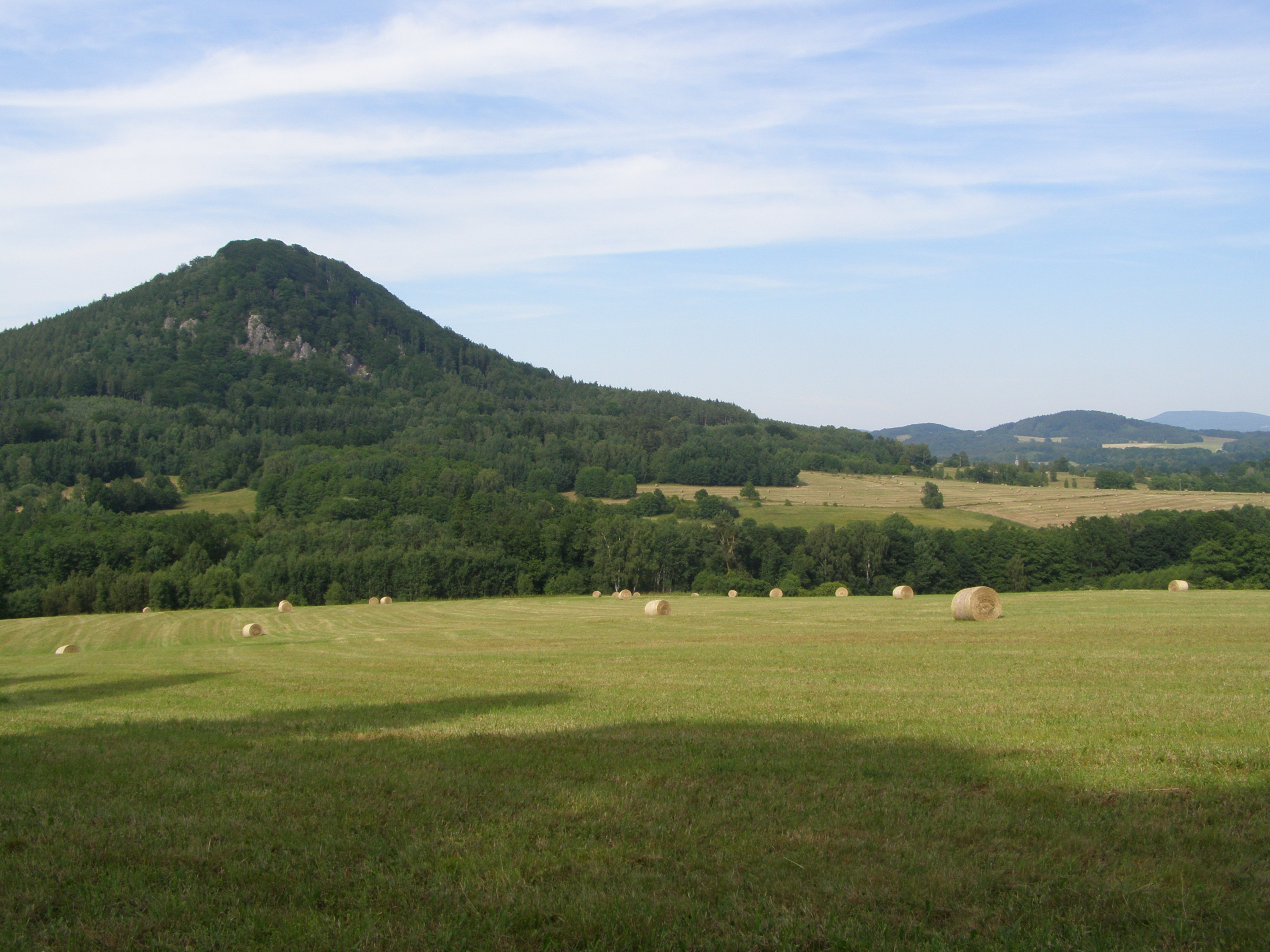 Cvikovská pahorkatina, vrchol Ortel (554 m), pohled od jihu